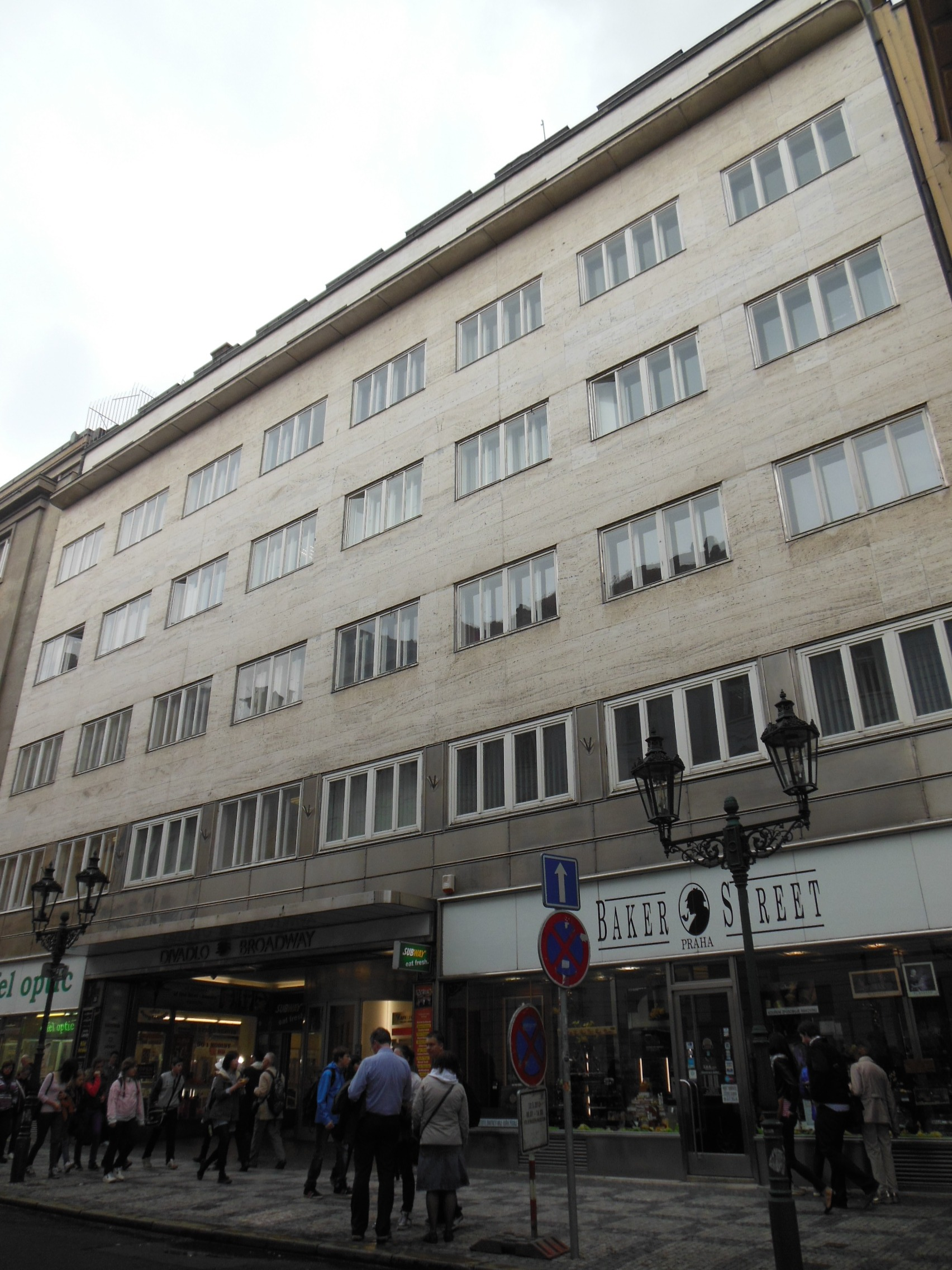 Část Divadla Broadway (hlavní část budovy v ulici Na Příkopě) v ulici Celetná na Starém Městě v Praze.